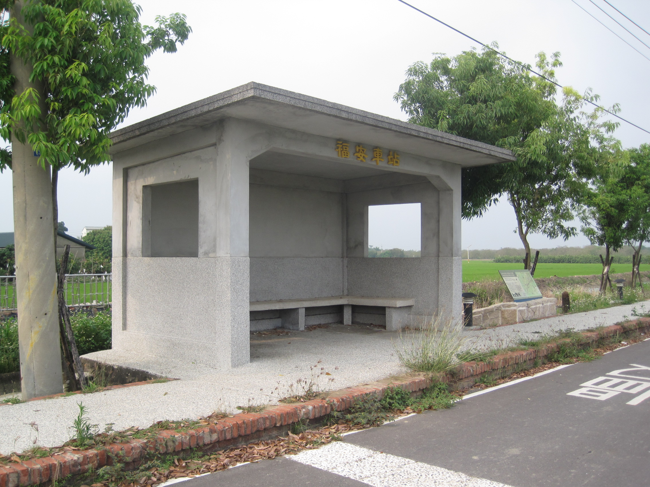 整理過的福安車站